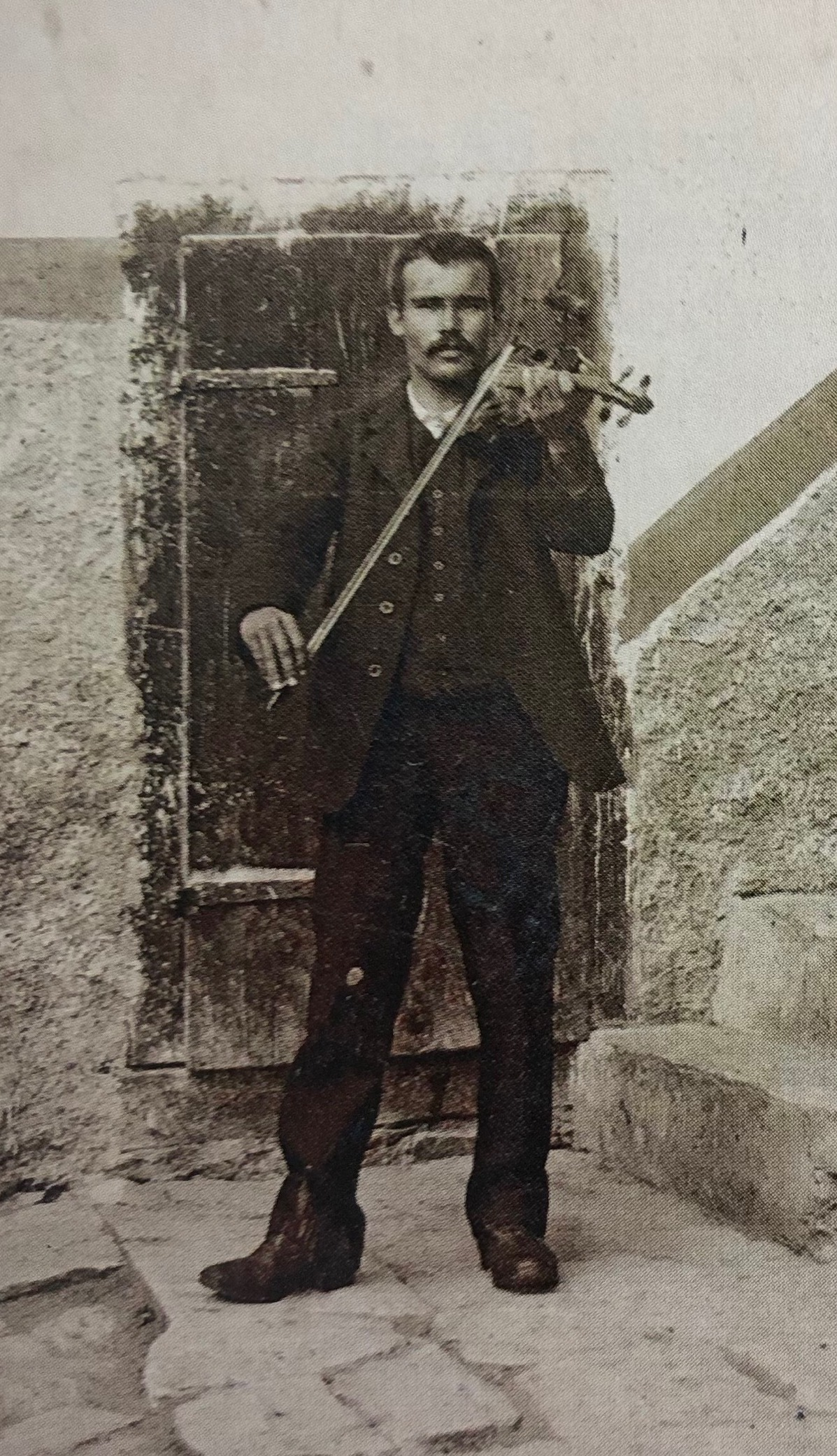 Tumasch Dolf, um 1925